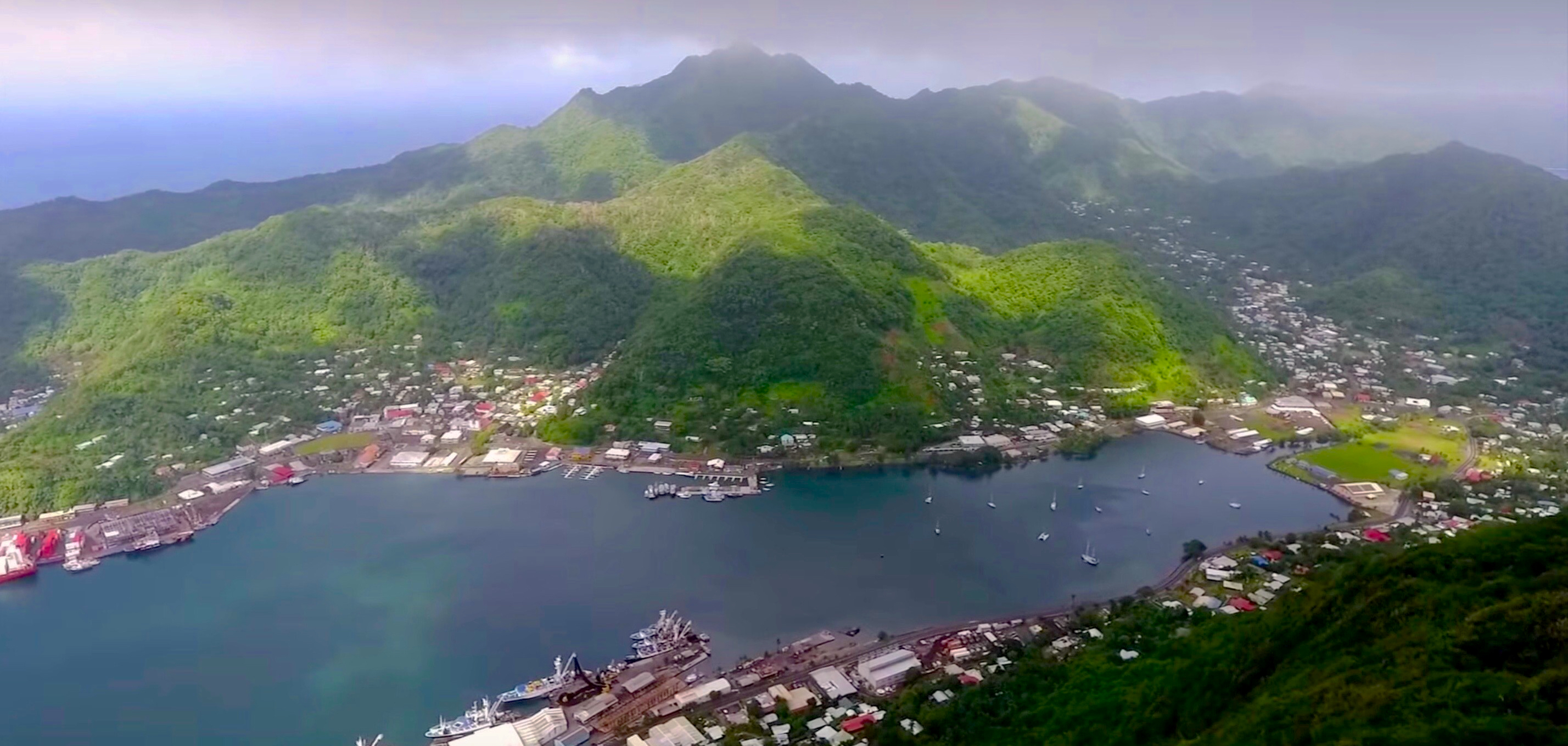 Gagana Samoa: O Pago Pago le taulaga pito tele o Amerika Sāmoa, i le motu o Tutuila.